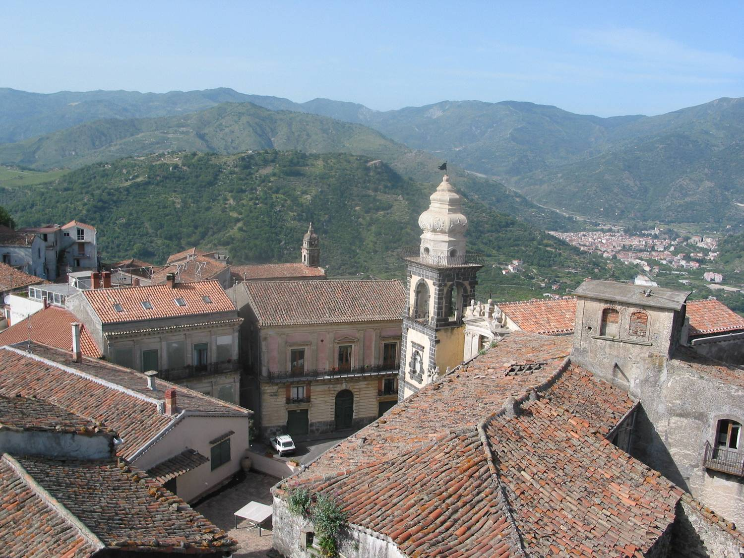 Chiesa di Sant'Antonio (esterni) This is a photo of a monument which is part of cultural heritage of Italy.